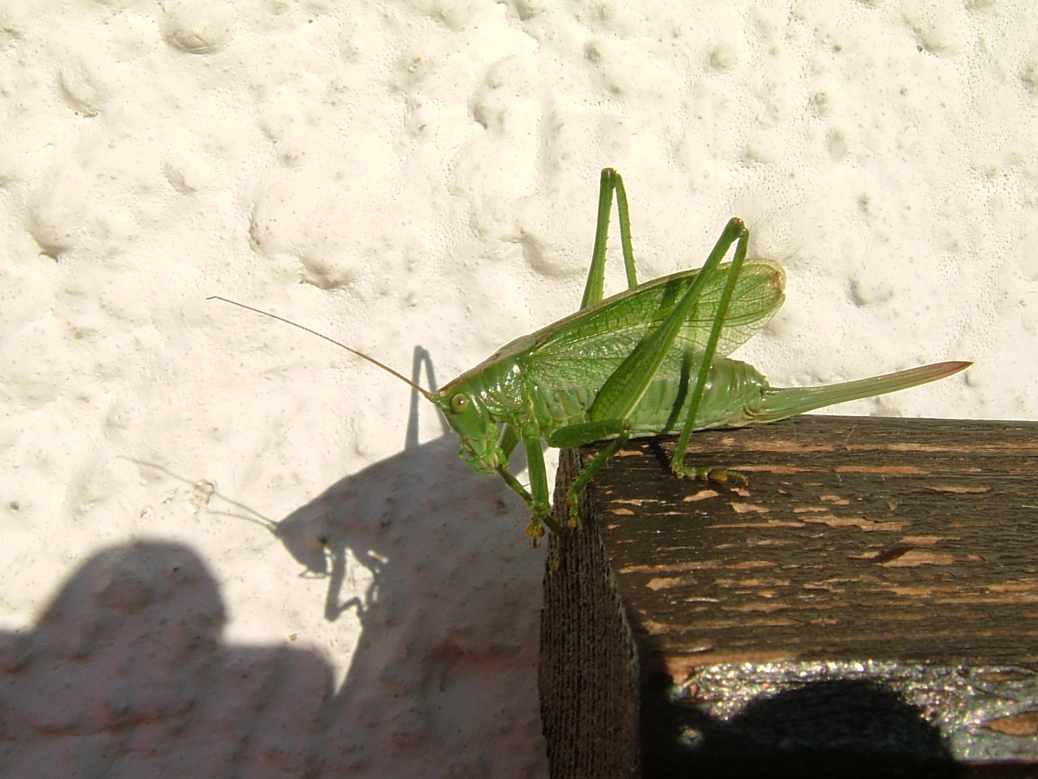 Zwitscherschrecke (Tettigonia cantans), fem., Staudach-Egerndach, Bayern, Deutschland, 540m NN